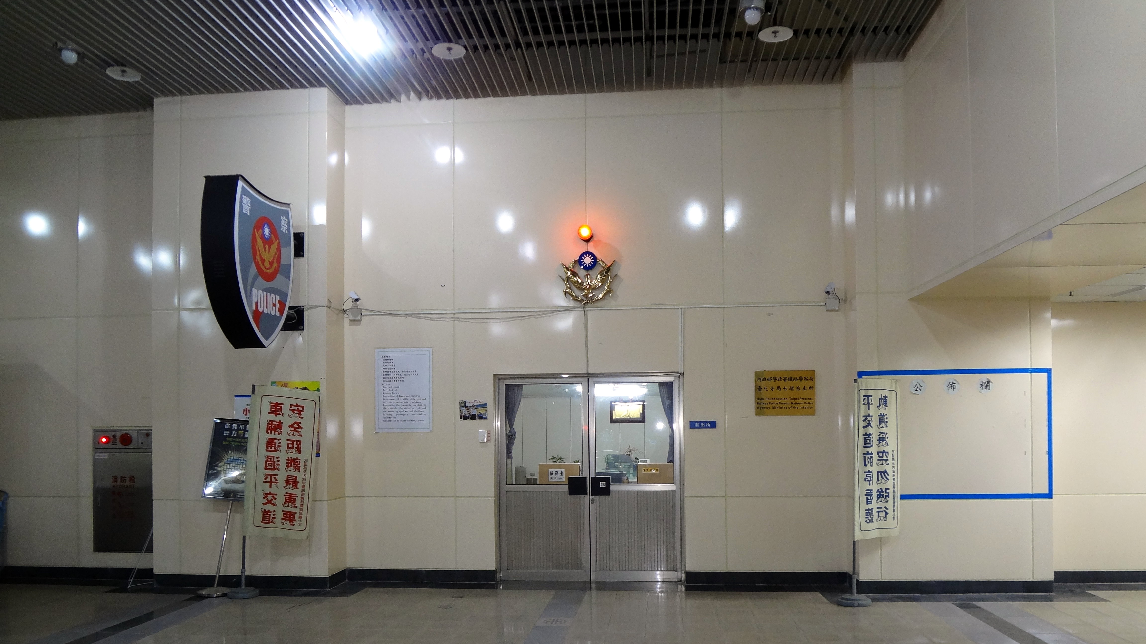 中華民國內政部警政署鐵路警察局臺北分局七堵派出所，位於臺灣鐵路管理局七堵車站1樓。